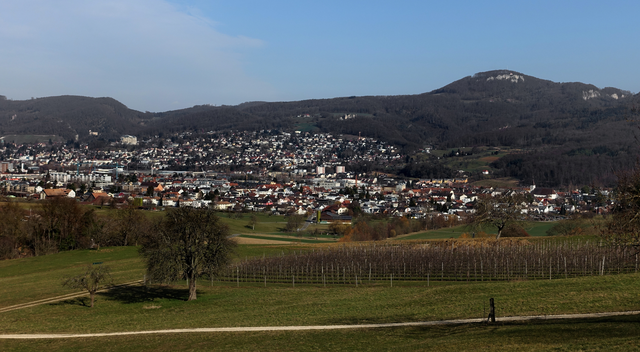 Panorama, Birstal, Aesch, Gempen